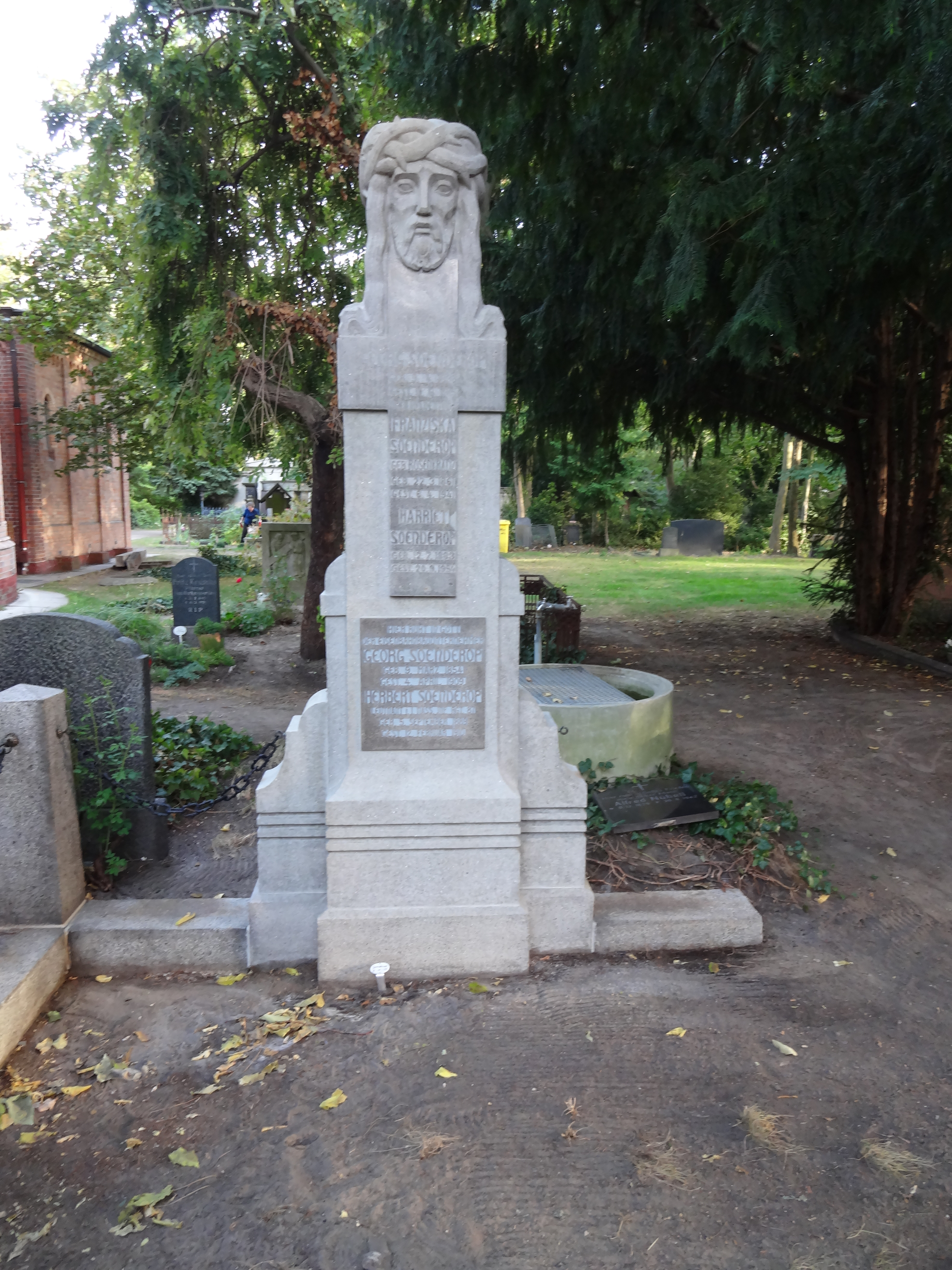 Grab des Eisenbahnunternehmers Georg Soenderop auf dem Alten Domfriedhof der St.-Hedwigsgemeinde in der Liesenstraße in Berlin